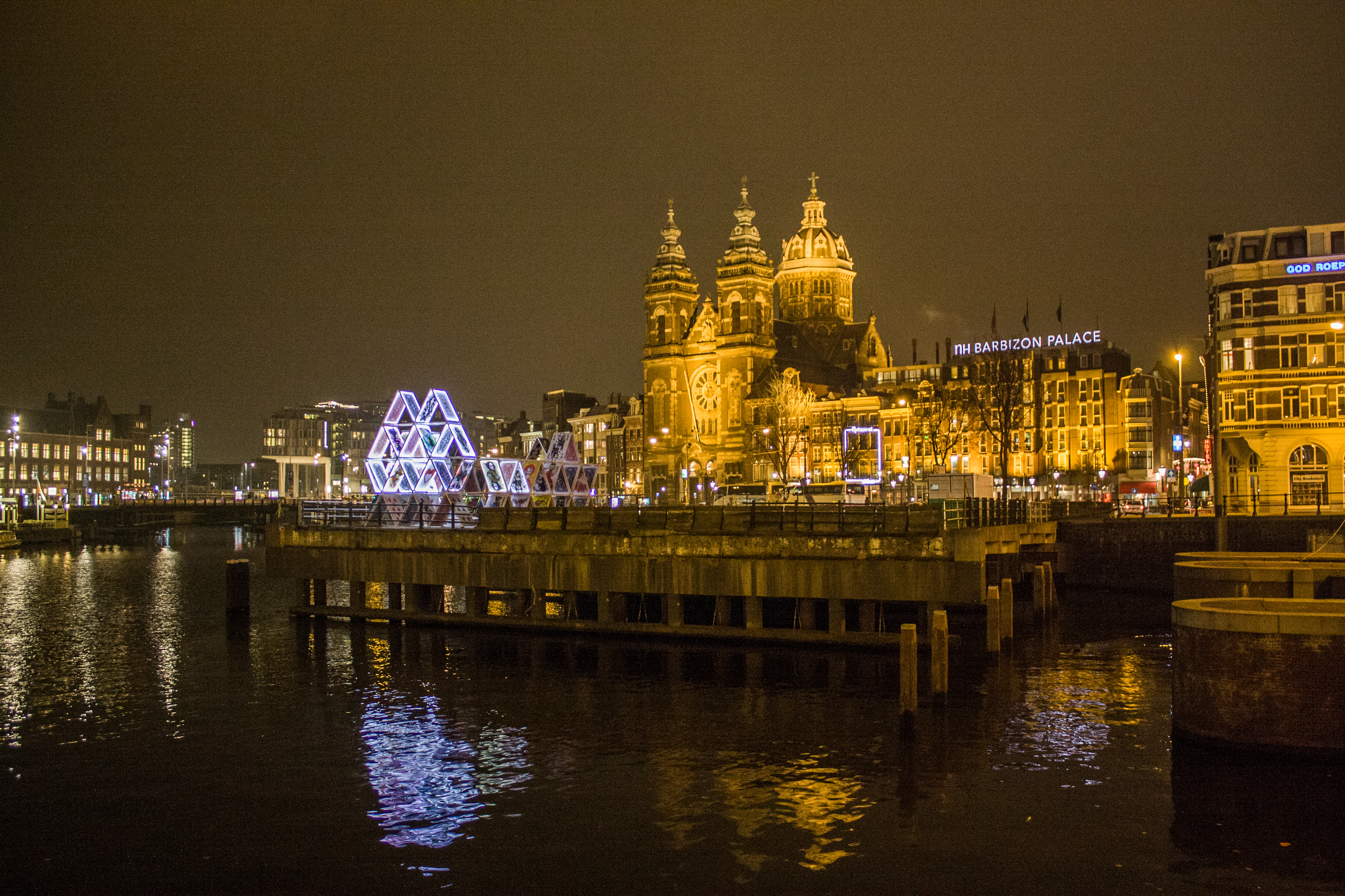 Amsterdam